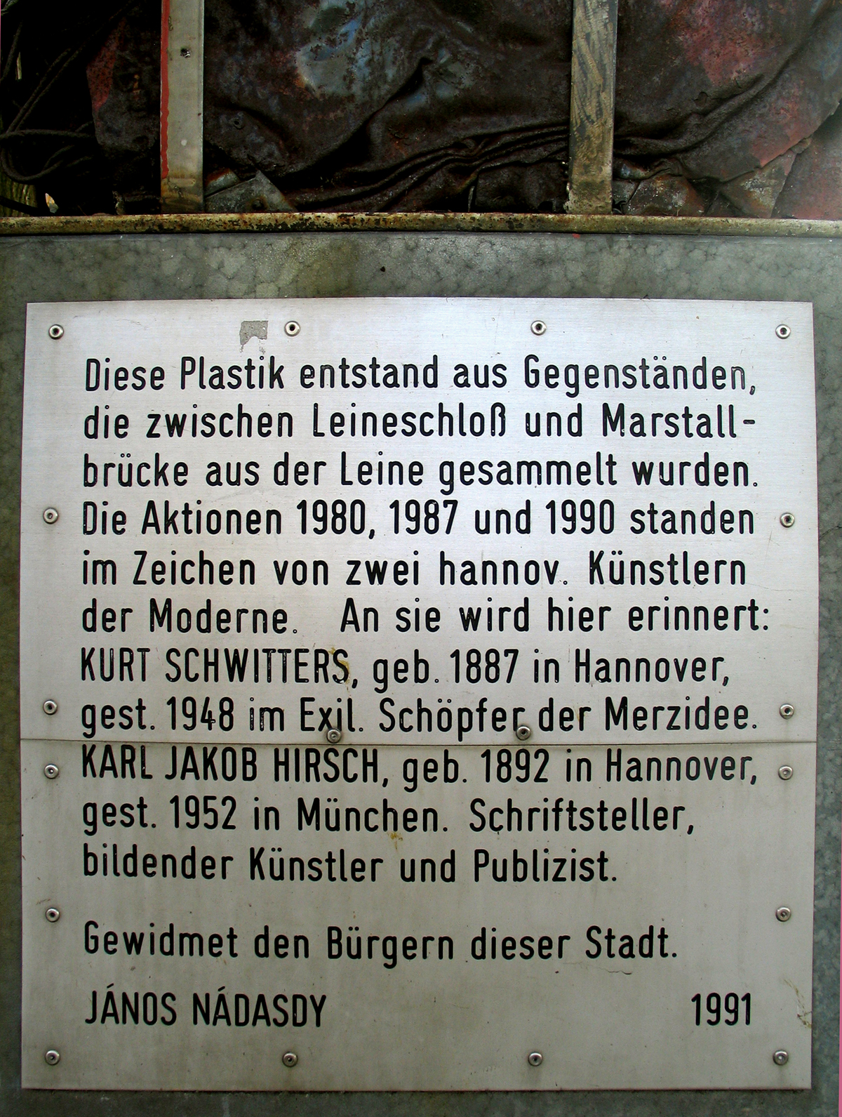 Diese Tafel brachte der Künstler János Nádasdy 1991 am Fuss seines "Denkmals für Kurt Schwitters und Karl Jakob Hirsch" an (Abschrift): "Diese Plastik entstand aus Gegenständen, die zwischen Leineschloß und Marstallbrücke aus der Leine gesammelt wurden. Die Aktionen 1980, 1987 und 1990 standen im Zeichen von zwei hannov[erschen] Künstlern der Moderne. An sie wird hier erinnert: KURT SCHWITTERS, geb. 1897, gest. 1948 im Exil. Schöpfer der Merzidee. KARL JAKOB HIRSCH, geb. 1892 in Hannover, gest. 1952 in München. Schriftsteller, bildender Künstler und Publizist. Gewidmet den Bürgern dieser Stadt. JÁNOS NÁDASDY. 1991" ...